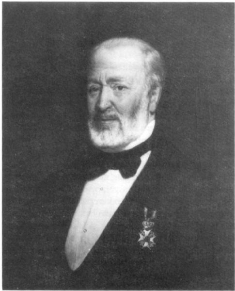 Schilderij met de afbeelding van Lucas Oldenhuis Gratama